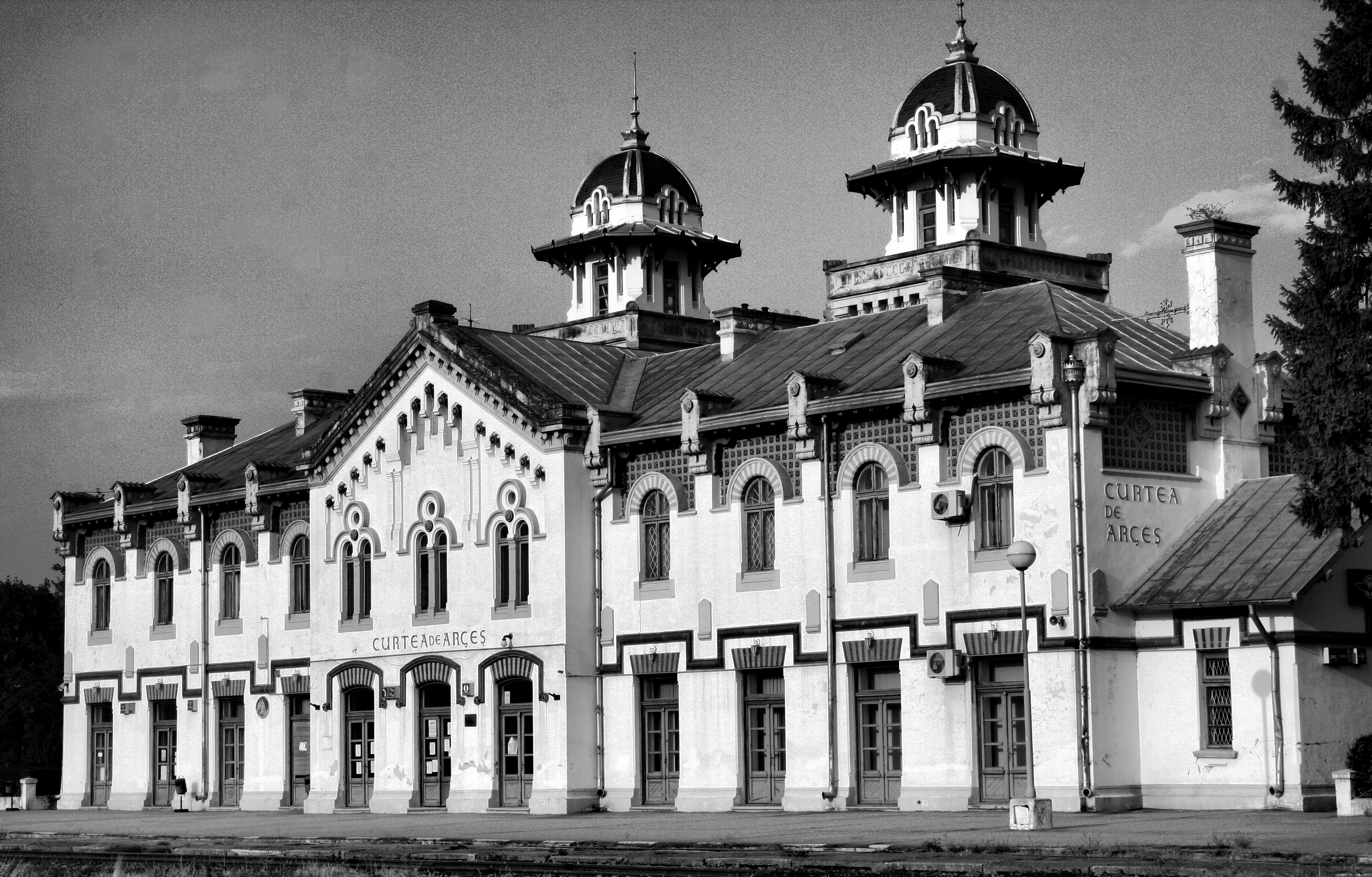 Gara Curtea de Arges